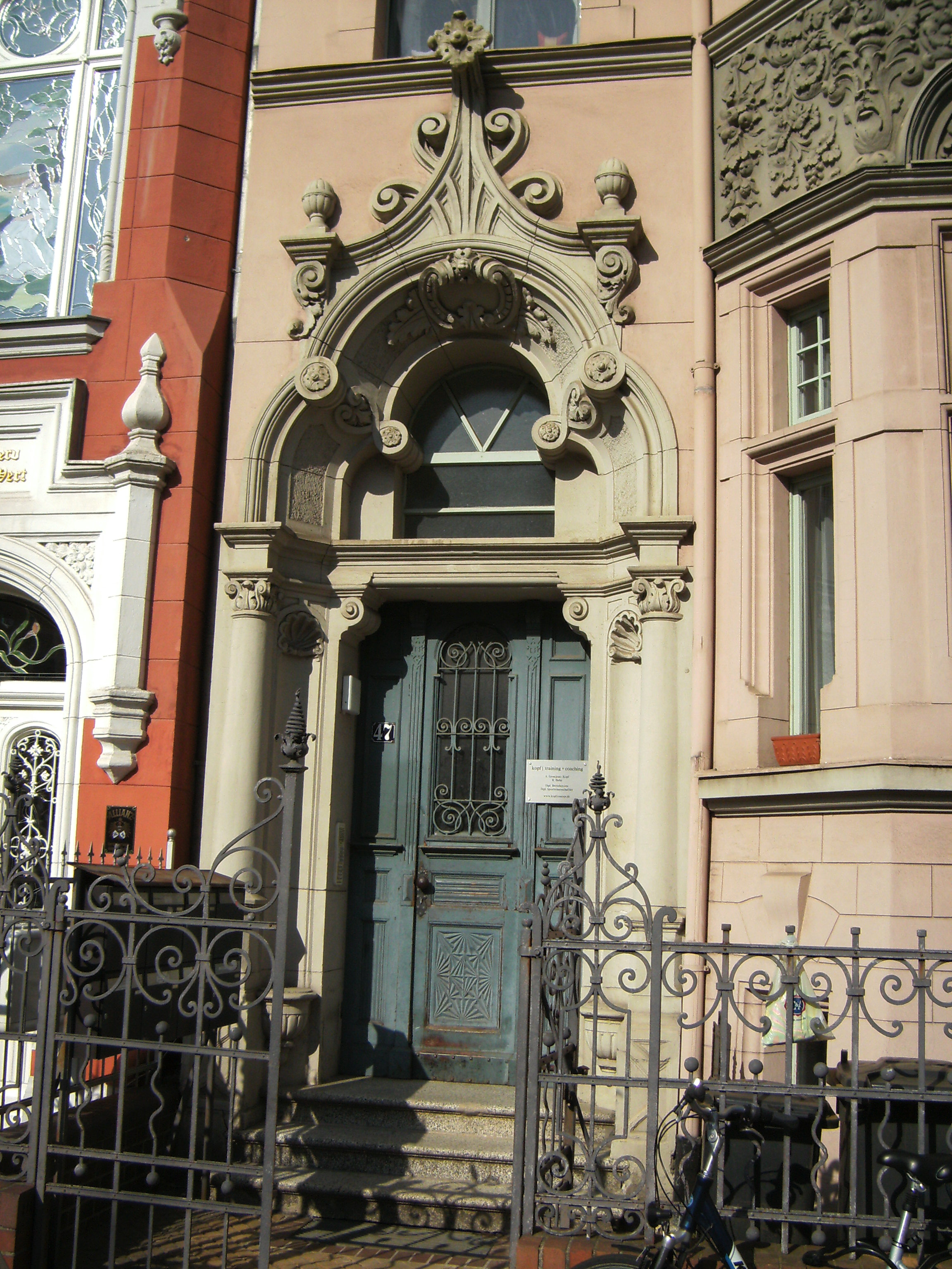 Schillerstraße 47,1